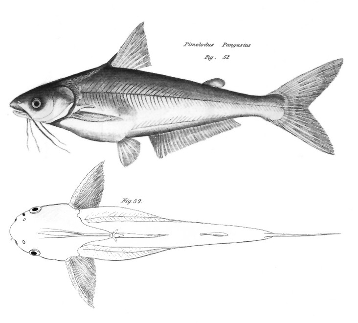 Drawing to the original description of Pangasius pangasius (Hamilton 1822) as Pimelodus pangasisus.